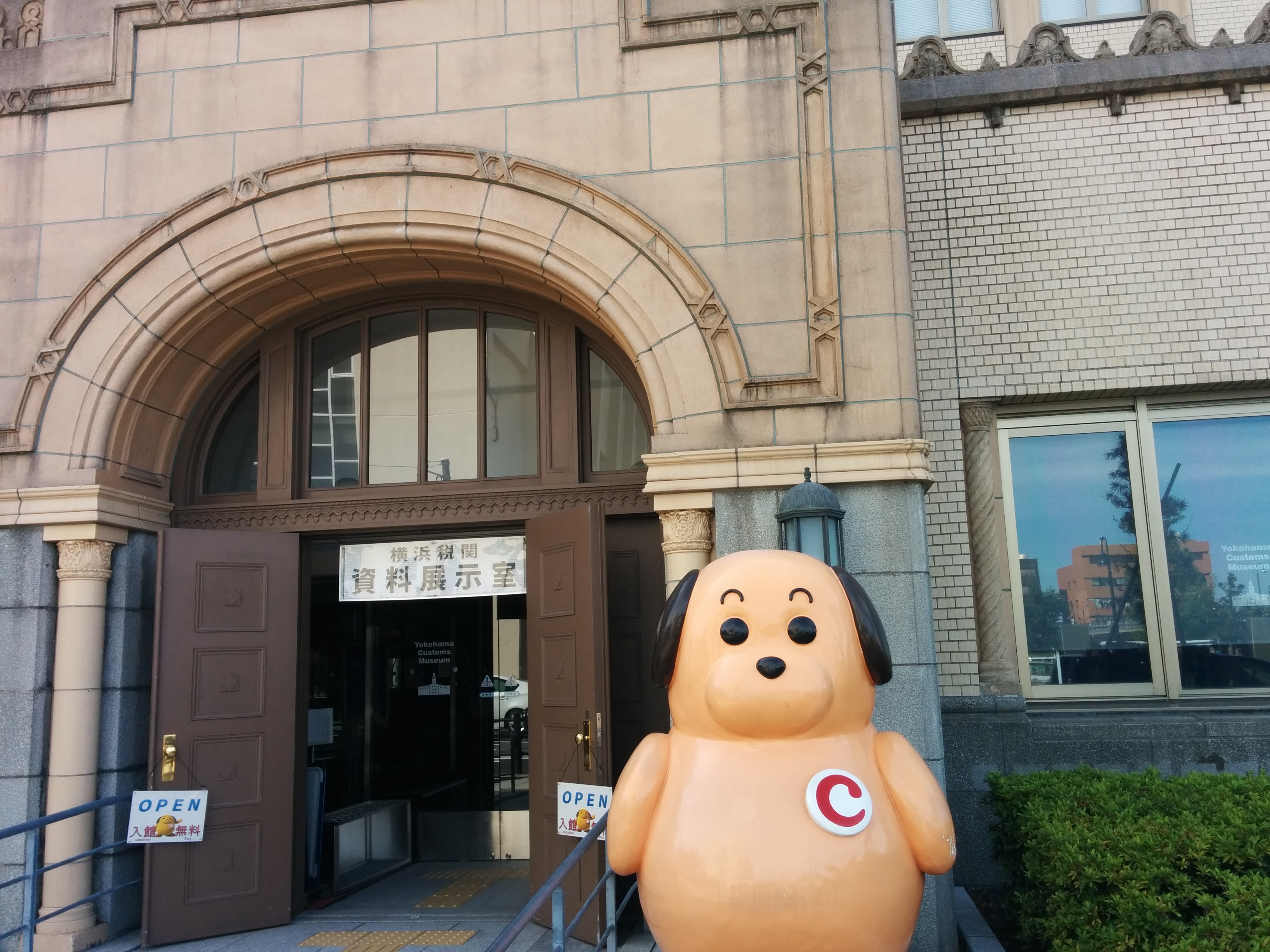 Yokohama Customs Museum